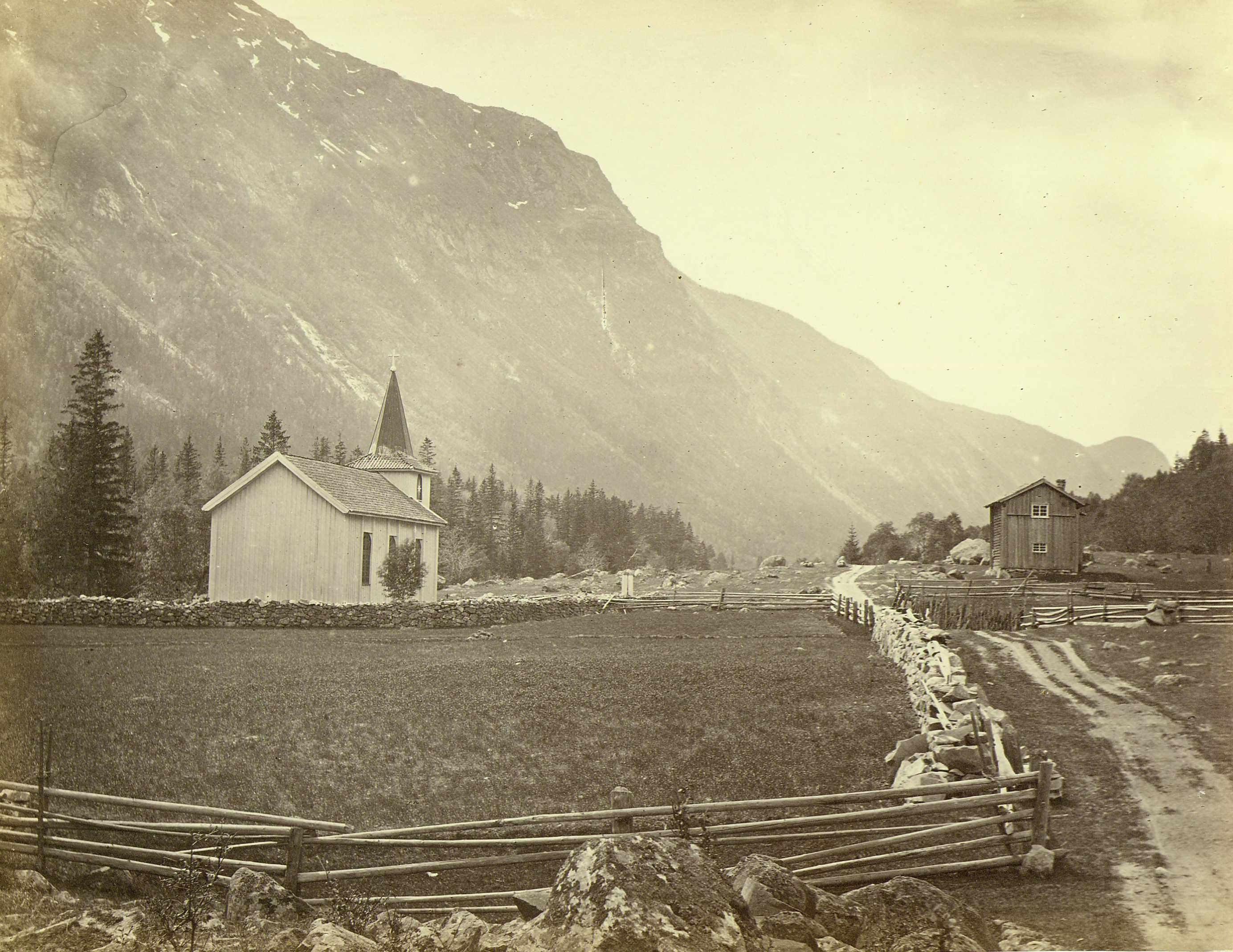 Landskap med Dal kirke, Vestfjorddalen, Tinn, Telemark. Veiparti med gjerder (tatt mellom 1864-1873). Fra serie norske landskapsfotografier tatt av den engelske fotografen Henry Rosling (1828-1911).